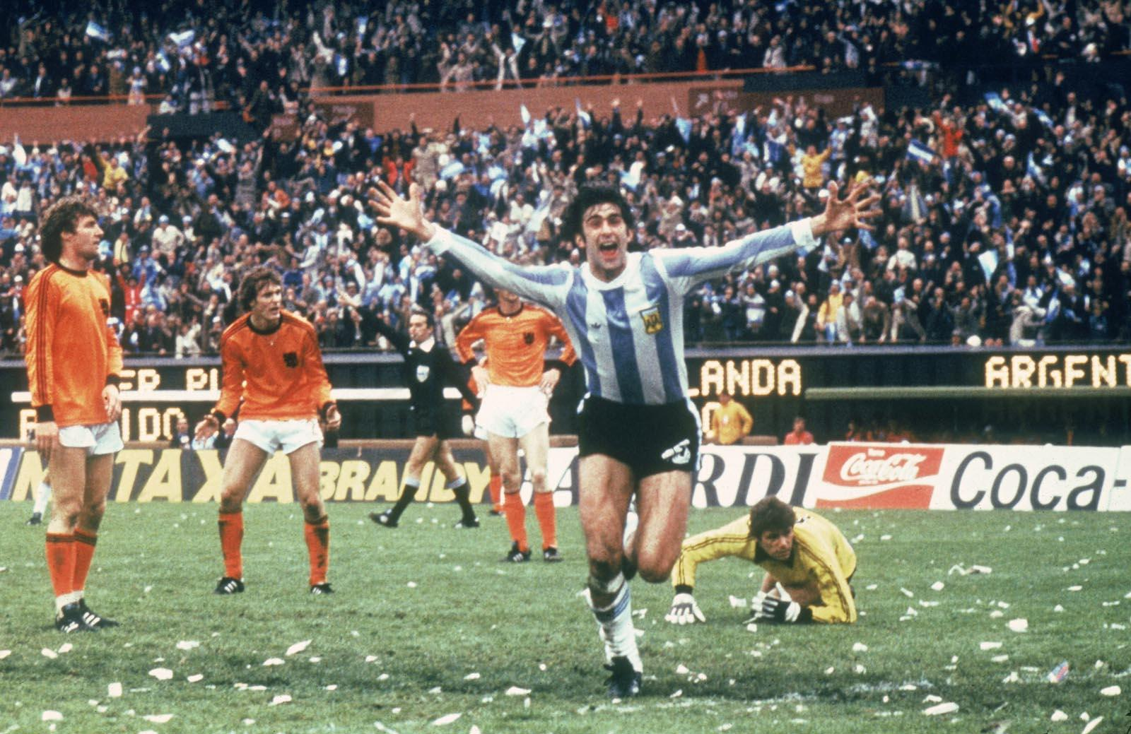 Kempes festejando uno de los goles en la final de la Copa Mundial 1978.